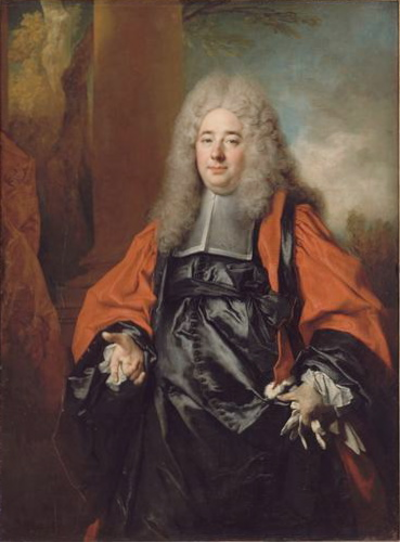 Louis-Urbain Le Peletier (1661-1730)